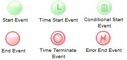 Události BPMN 2.0